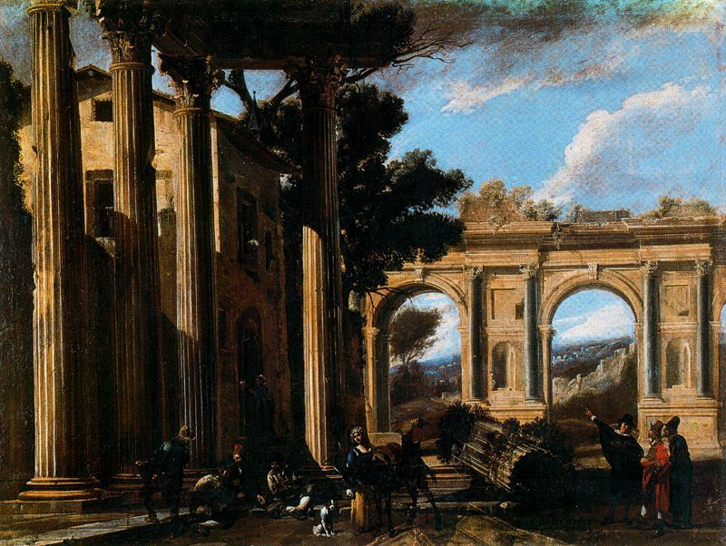 Viviano Codazzi, Capricho arquitectónico, (73x98 cm.), Florencia, Galería Uffizi.